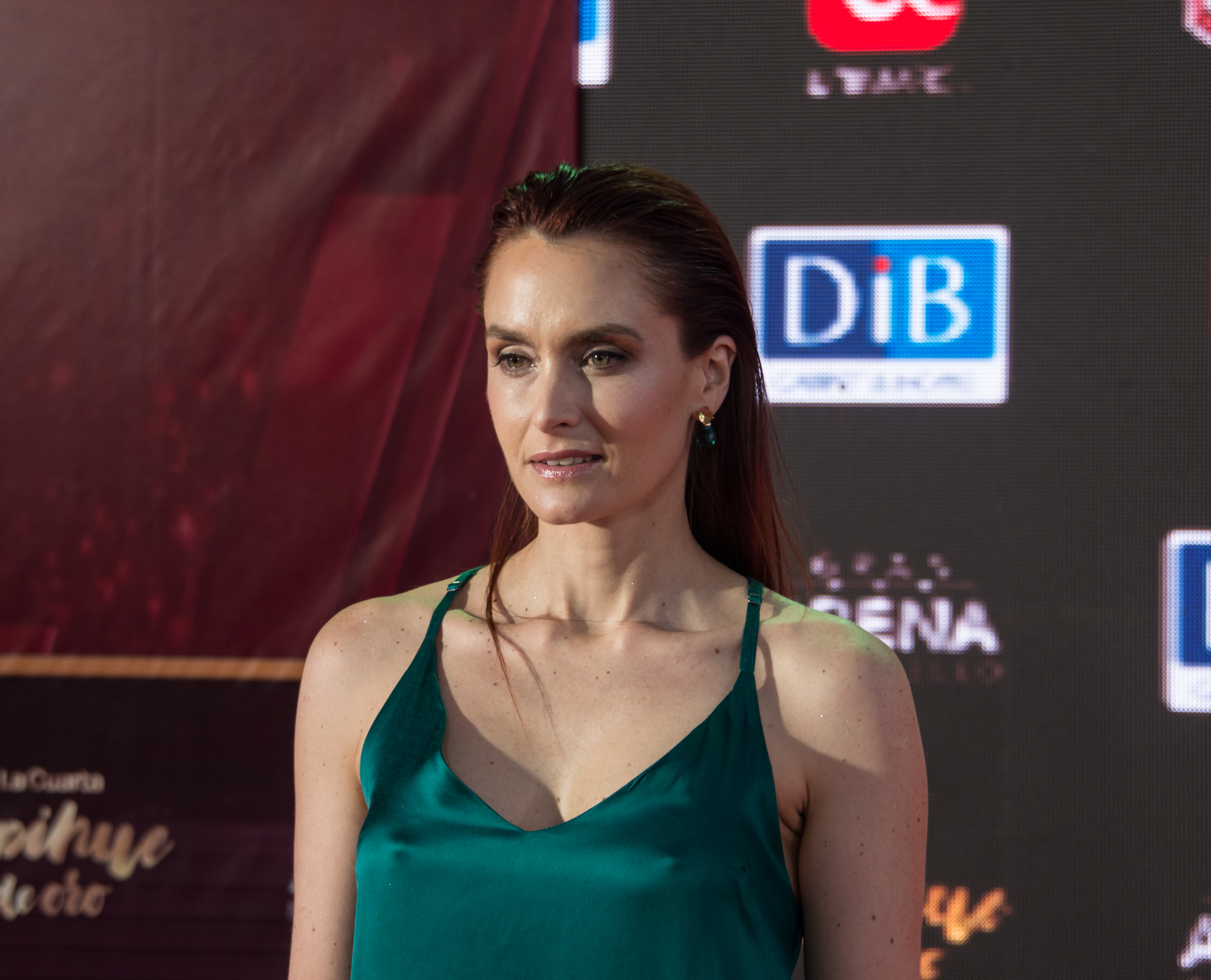 Begoña Basauri, Copihue de Oro 2018, Sun Monticello, Mostazal, Región de O'Higgins, Chile